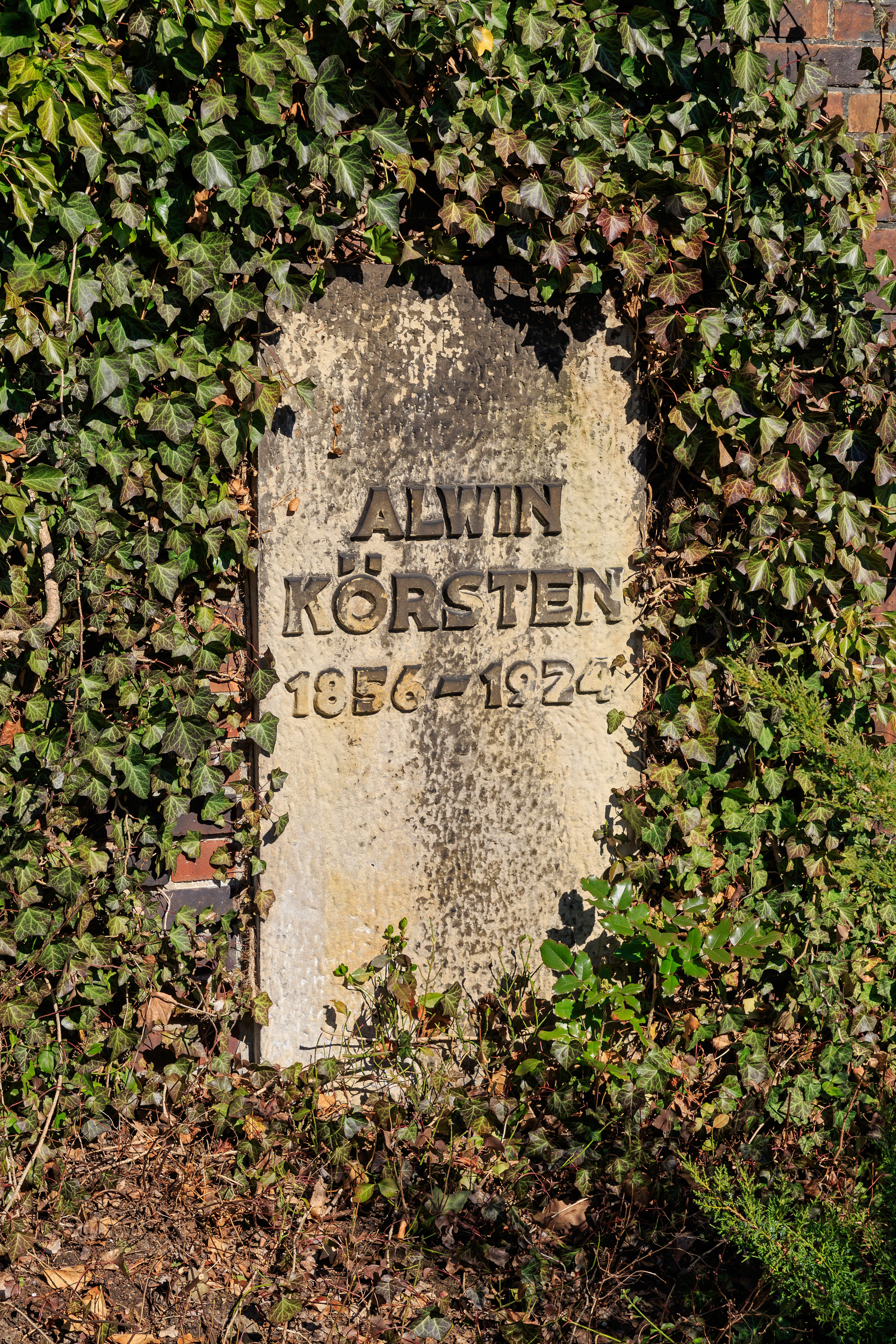 Zentralfriedhof Friedrichsfelde, Berlin-Lichtenberg. Gedenkstätte der Sozialisten, Grab von Alwin Körsten.